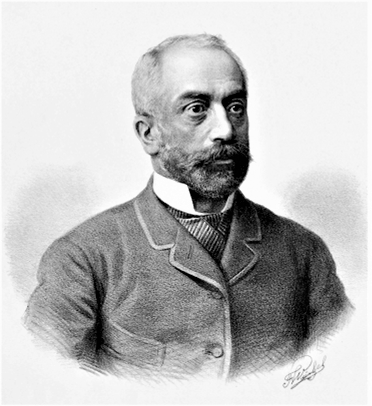 Johann (Ioan, Iancu) Ritter von Zotta (1840-1896), um 1890, Großgrundbesitzer, Jurist, Abgeordneter des Bukowiner Landtags sowie des österreichischen Reichsrats